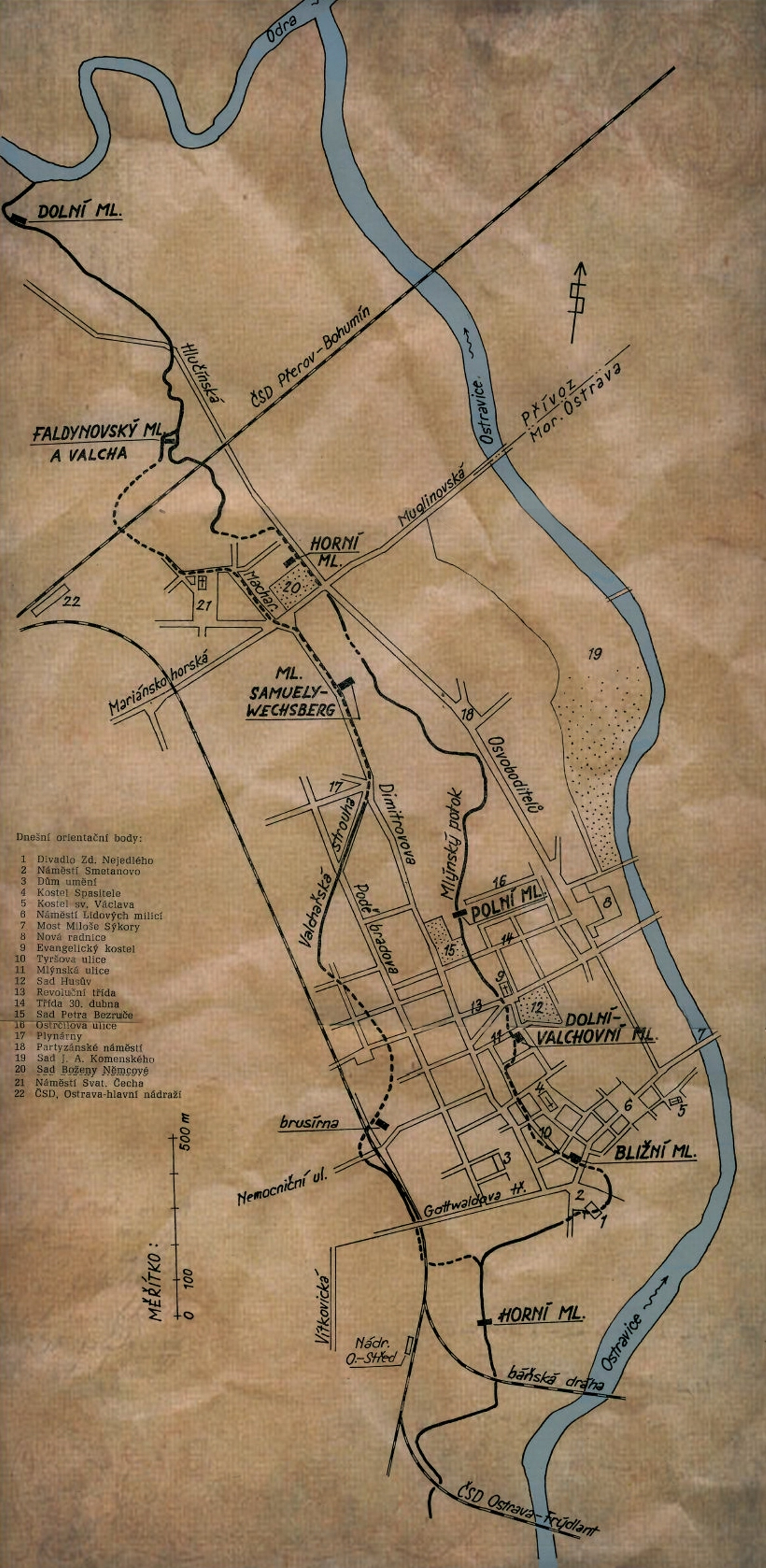 Situace Mlýnského náhonu v Moravské Ostravě a Přívoze včetně osmi mlýnů